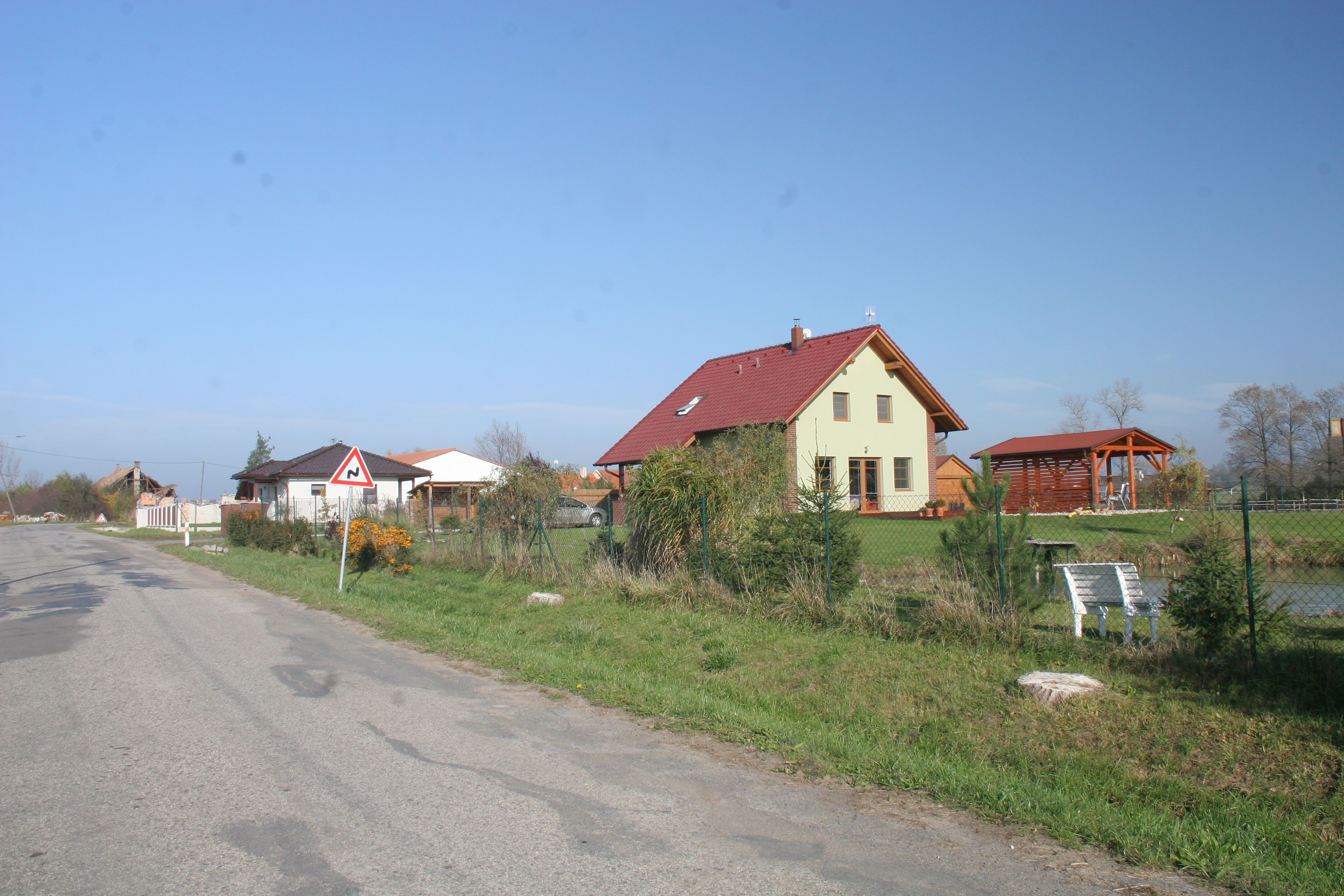 Roveňsko čp. 38